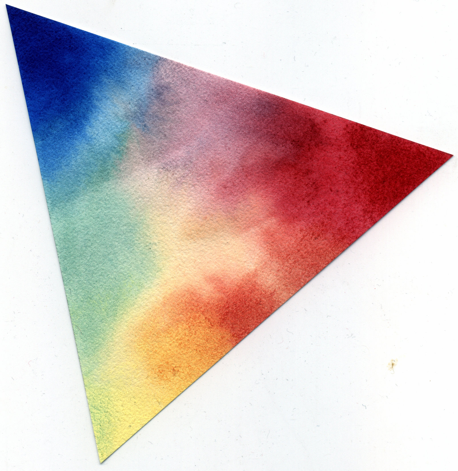 mélanges de couleurs aquarelle : Jaune Benzimidazolone H6G (PY175) Bleu phtalo (PB15) ; rouge Quinacridone (PR206). Windsor et Newton série Cotman.